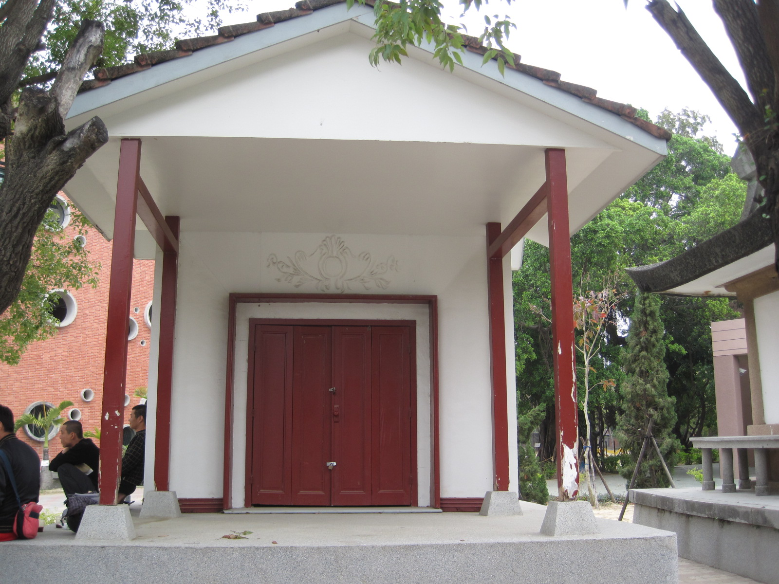 新化奉安殿旁的講堂小舞臺